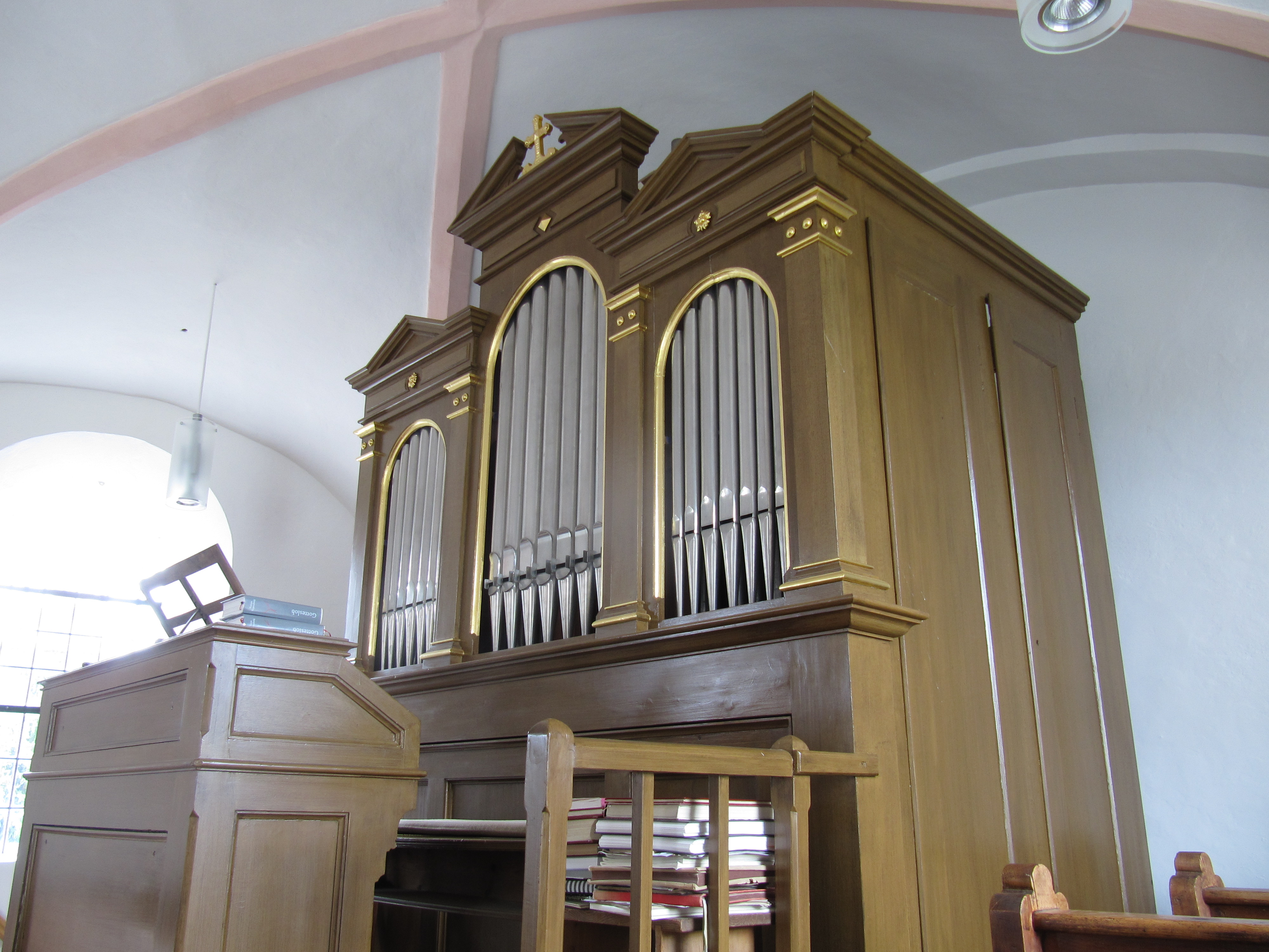 Orgel der Kirche Niederhornbach, erbaut von Binder & Siemann, Regensburg